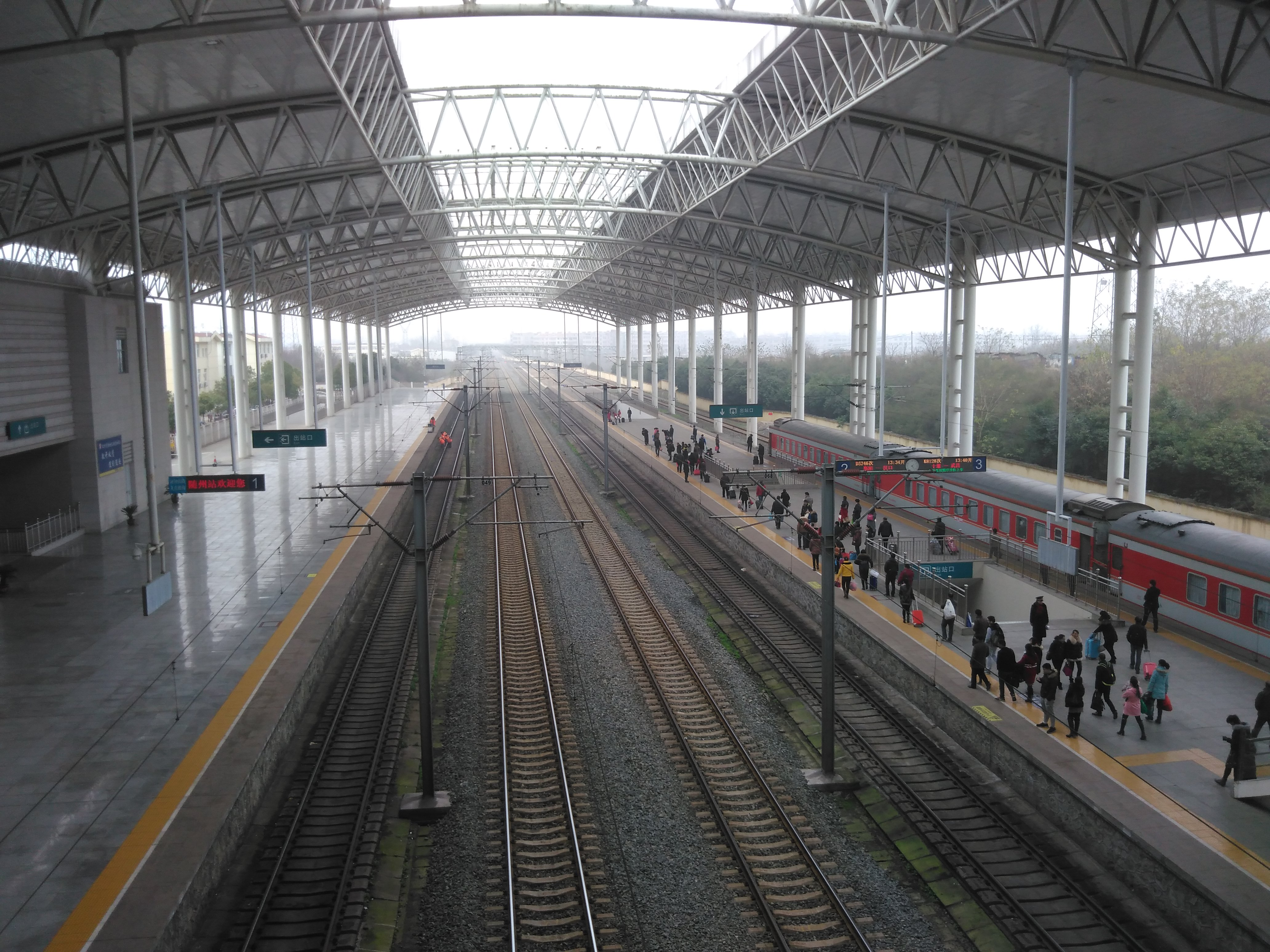 中文（中国大陆）: 湖北省随州市火车站